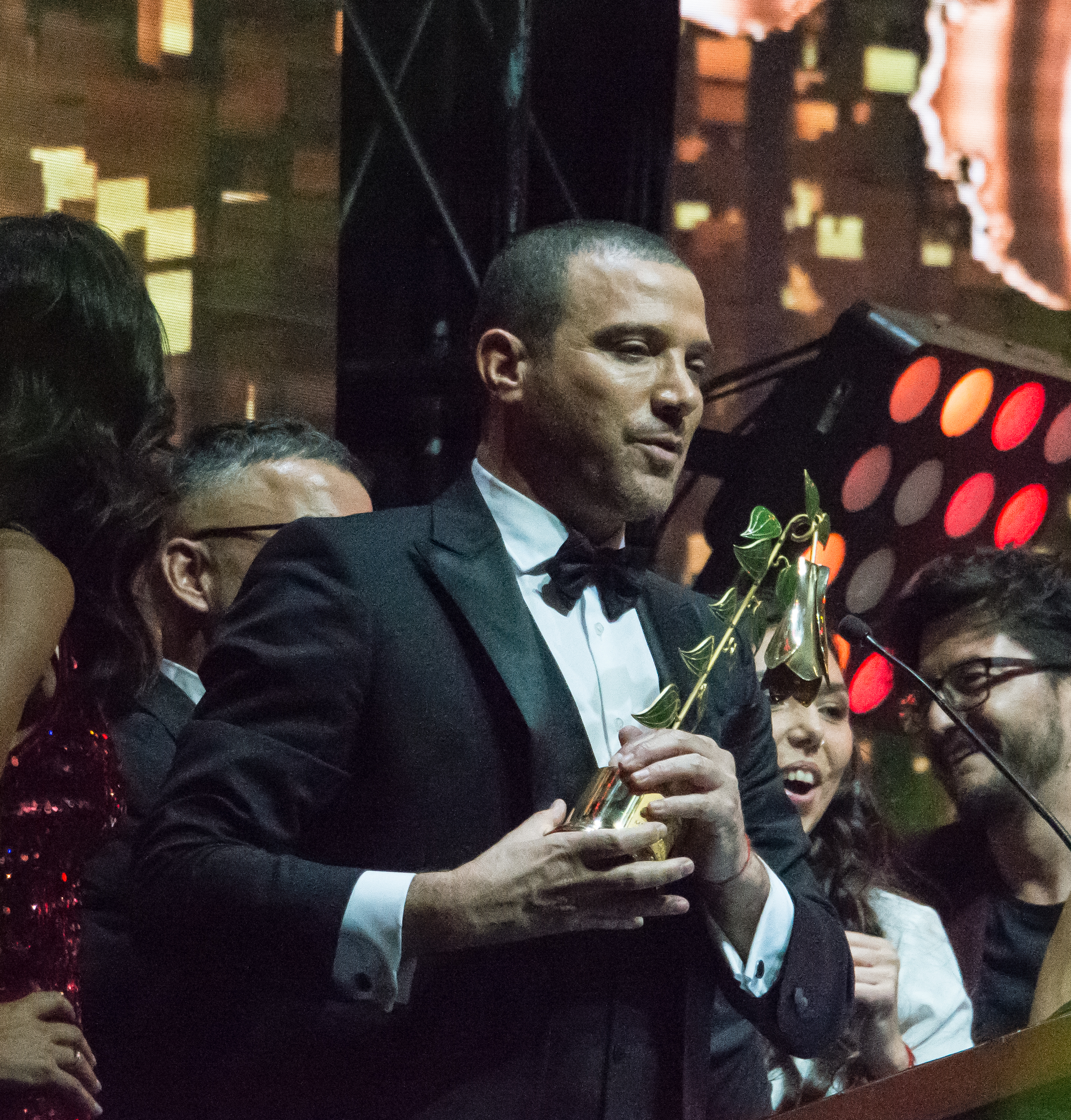 Julián Elfenbein, Copihue de Oro 2018, Sun Monticello, Mostazal, Región de O'Higgins, Chile